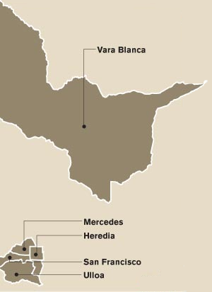 Mapa de los distritos del cantón de Heredia, provincia de Heredia, Costa Rica.